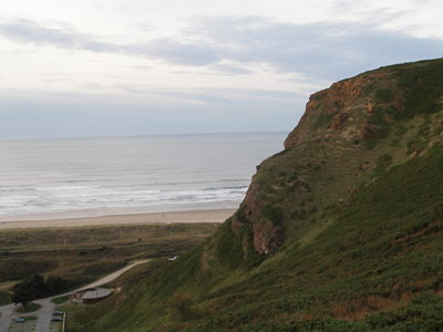 Acantilados del Cabo Negro en la playa de Xagó